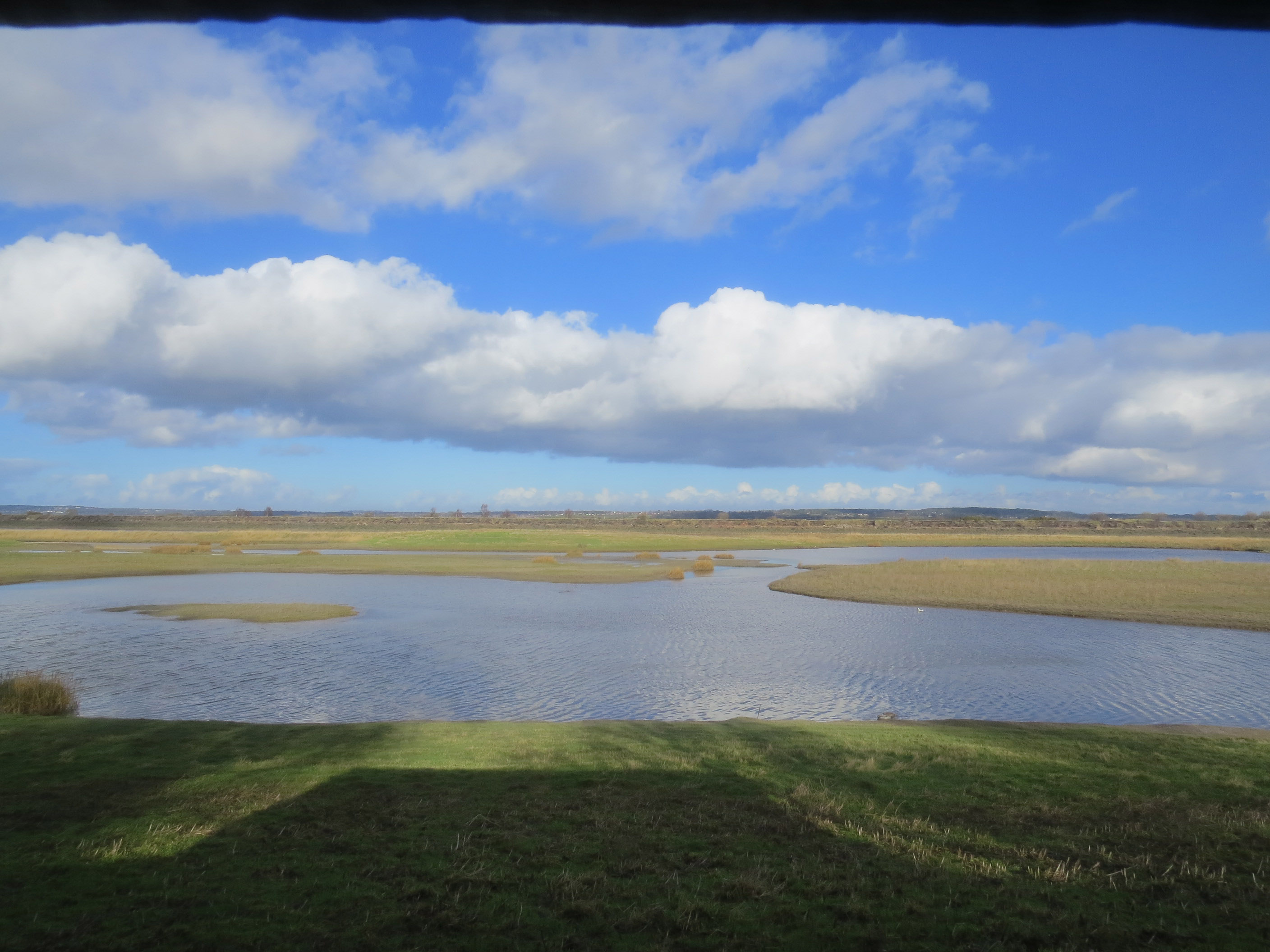 Gwarchodfa Natur Deeside Naturalists